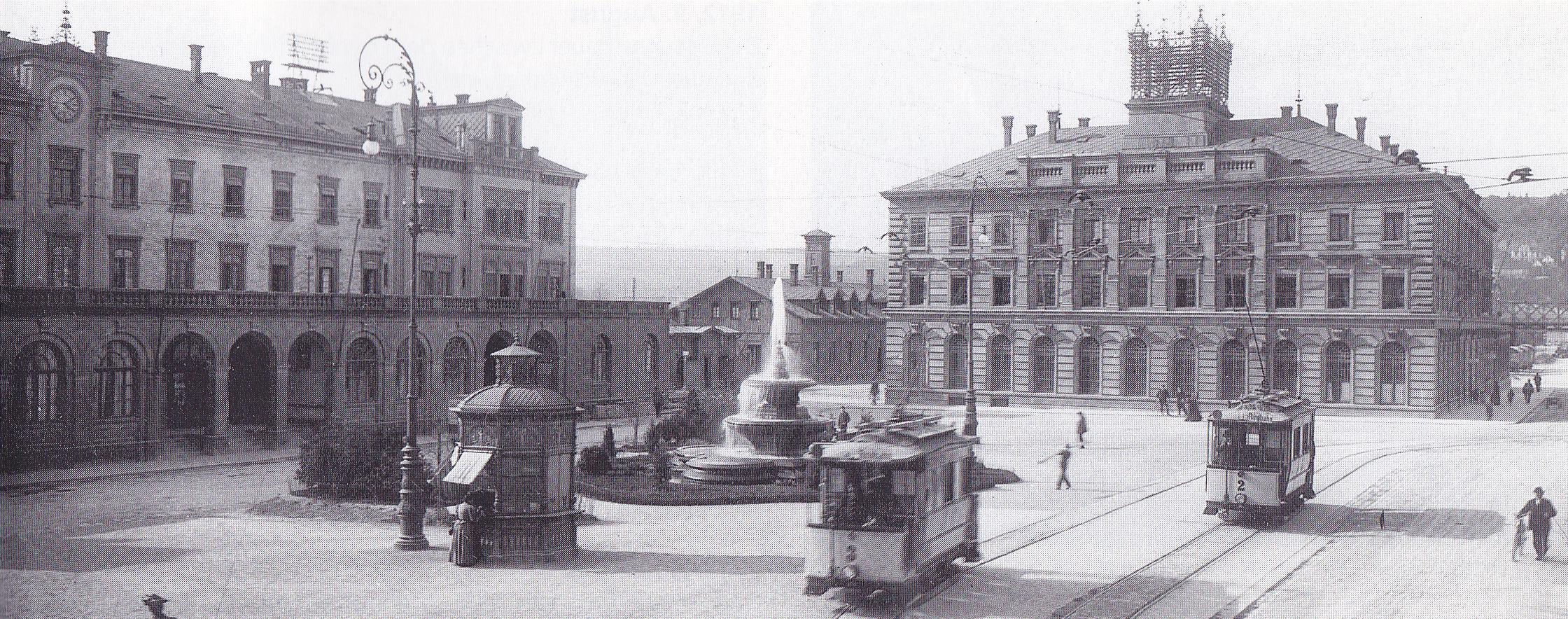 Bahnhofplatz Ulm 1904, von links nach rechts: Empfangsgebäude, Schalenbrunnen, Toilettenhäuschen, Güterabfertigung, Hauptpost